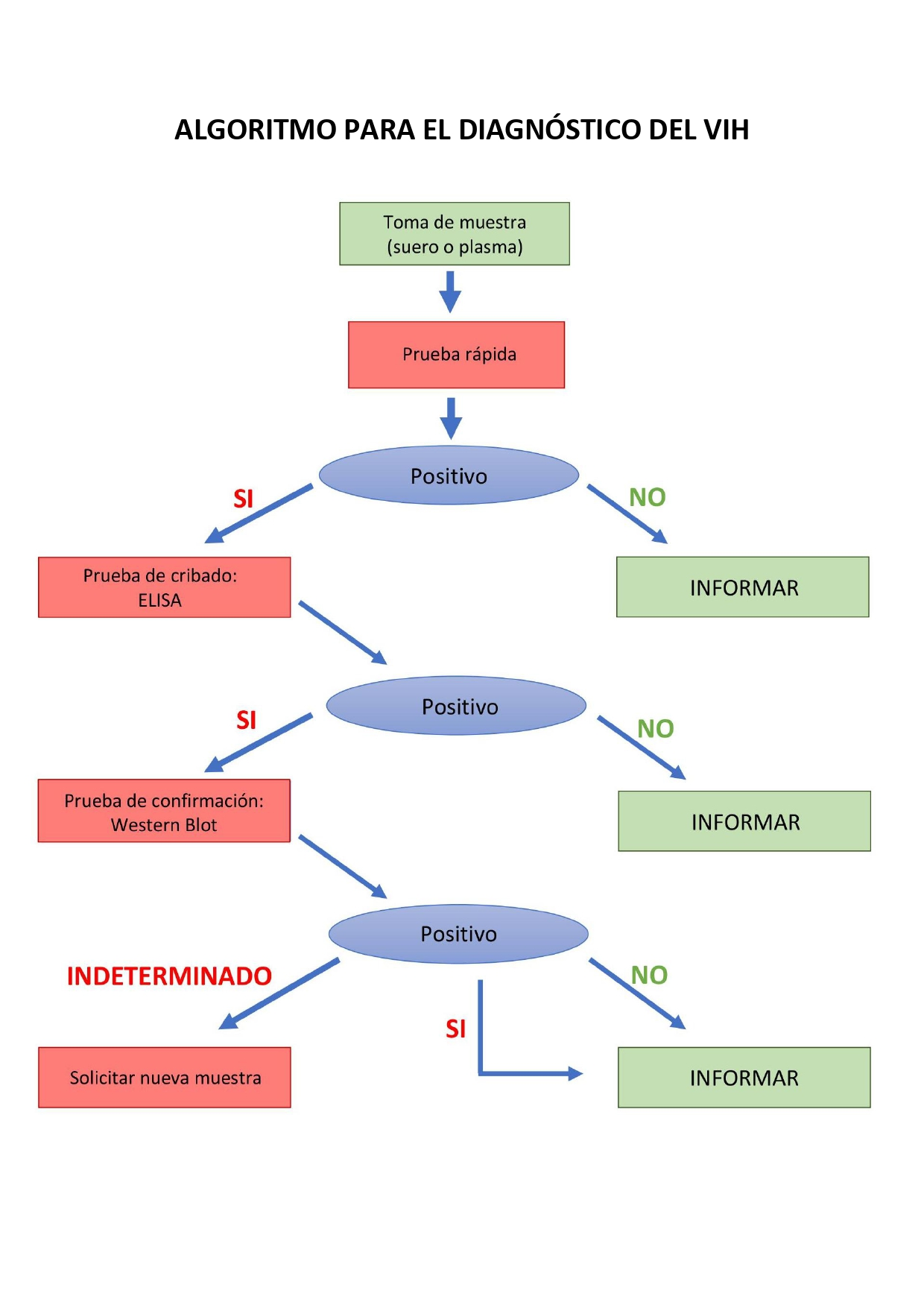 Esquema sobre el algoritmo seguido para el diagnóstico del VIH.